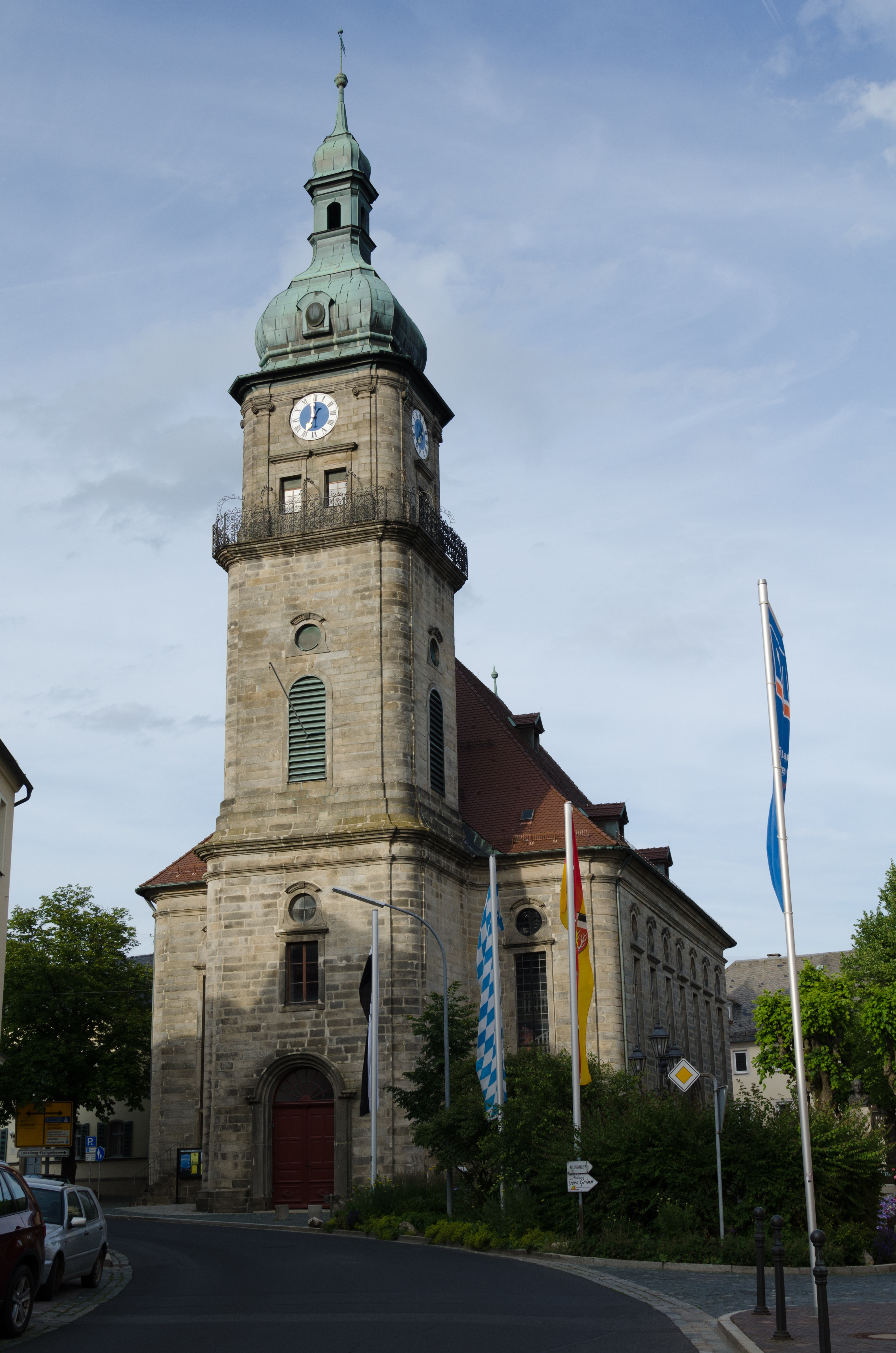 Evang.-Luth. Pfarrkirche St. Veit und St. Martin in Wunsiedel